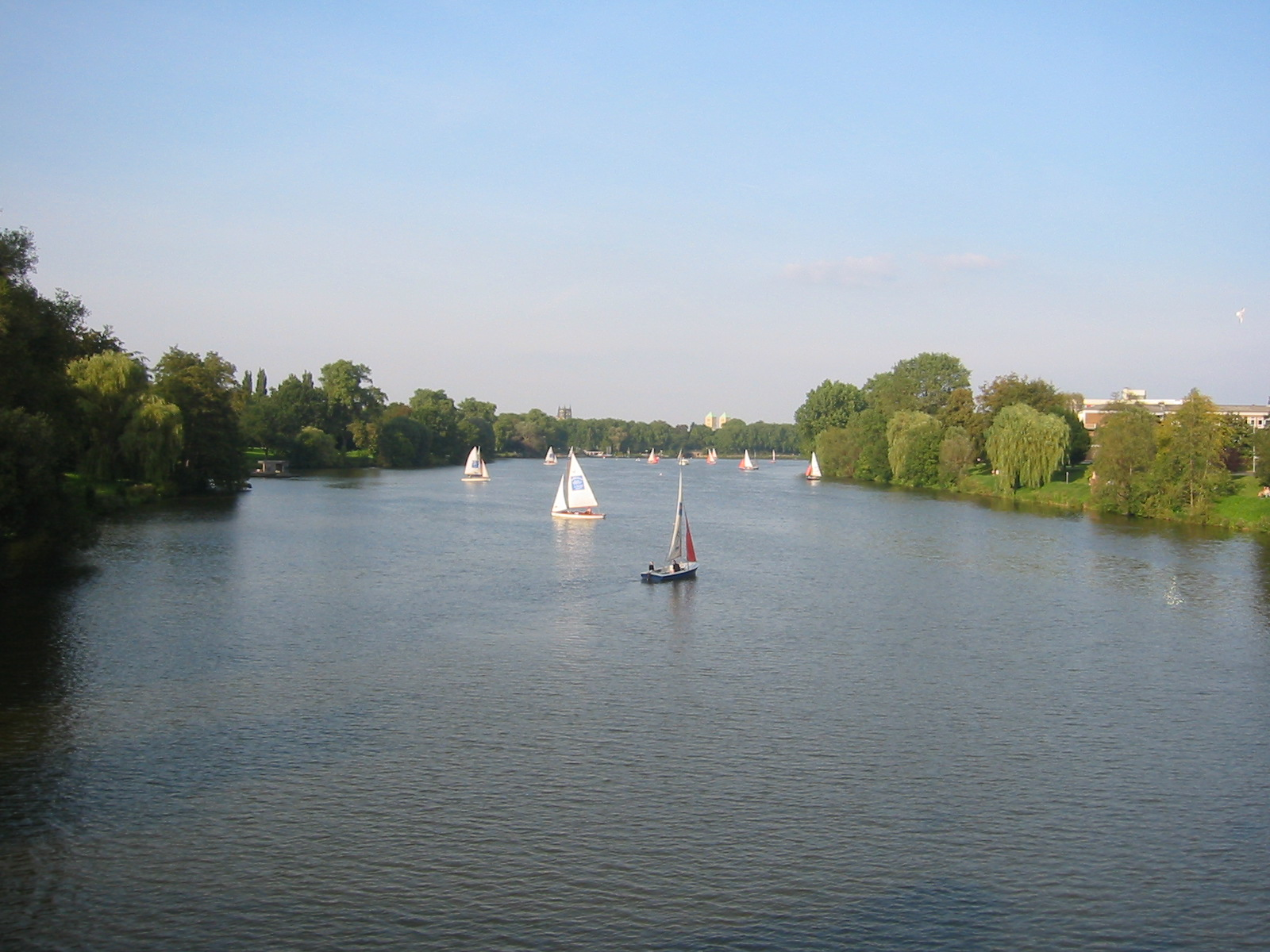 Aasee in Münster. Im Hintergrund: Turm der Überwasserkirche sowie die Türme des St. Paulus-Doms.